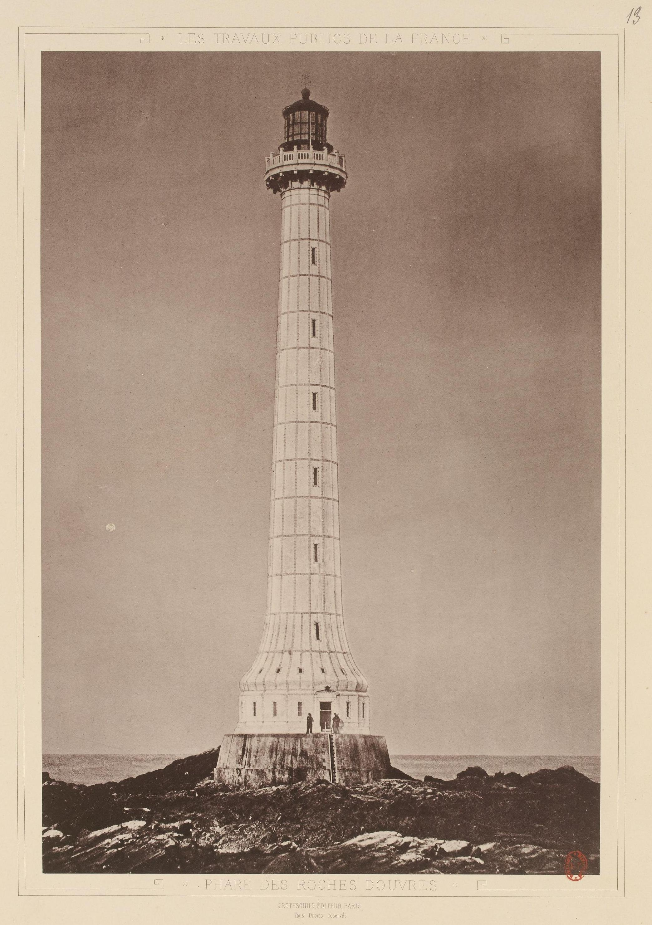 Phare des Roches Douvres dans le livre Les Travaux publics de la France, Tome cinquième